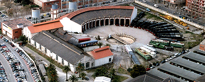 Museu del Ferrocarril- vista aèria